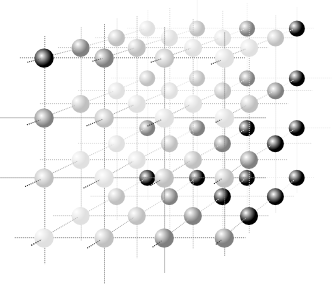 Modellhafte Veranschaulichung des Voxelgitters einer Volumengrafik. --Thetawave 21:08, 23. Dez 2005 (CET)